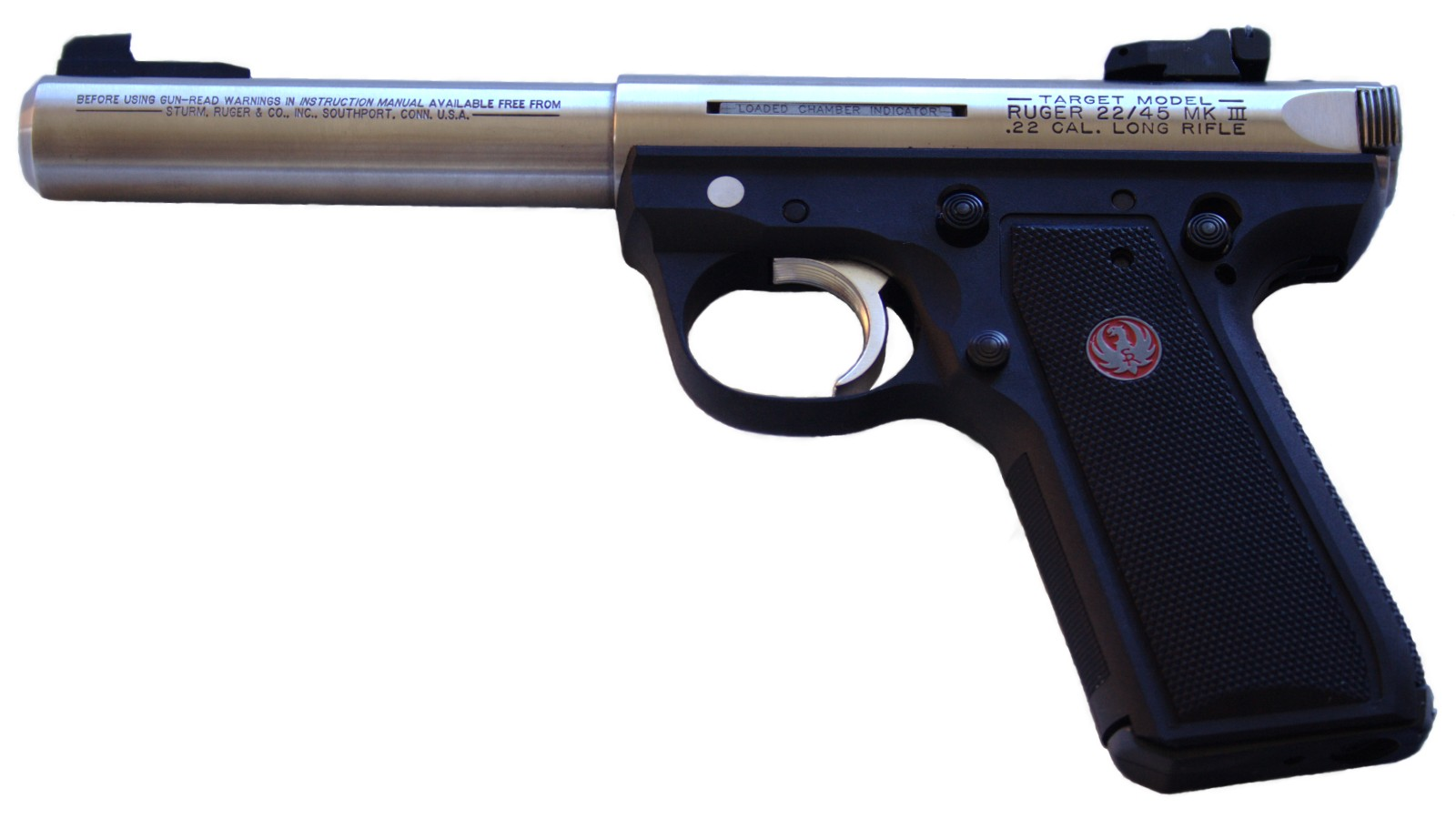 Ruger MK III